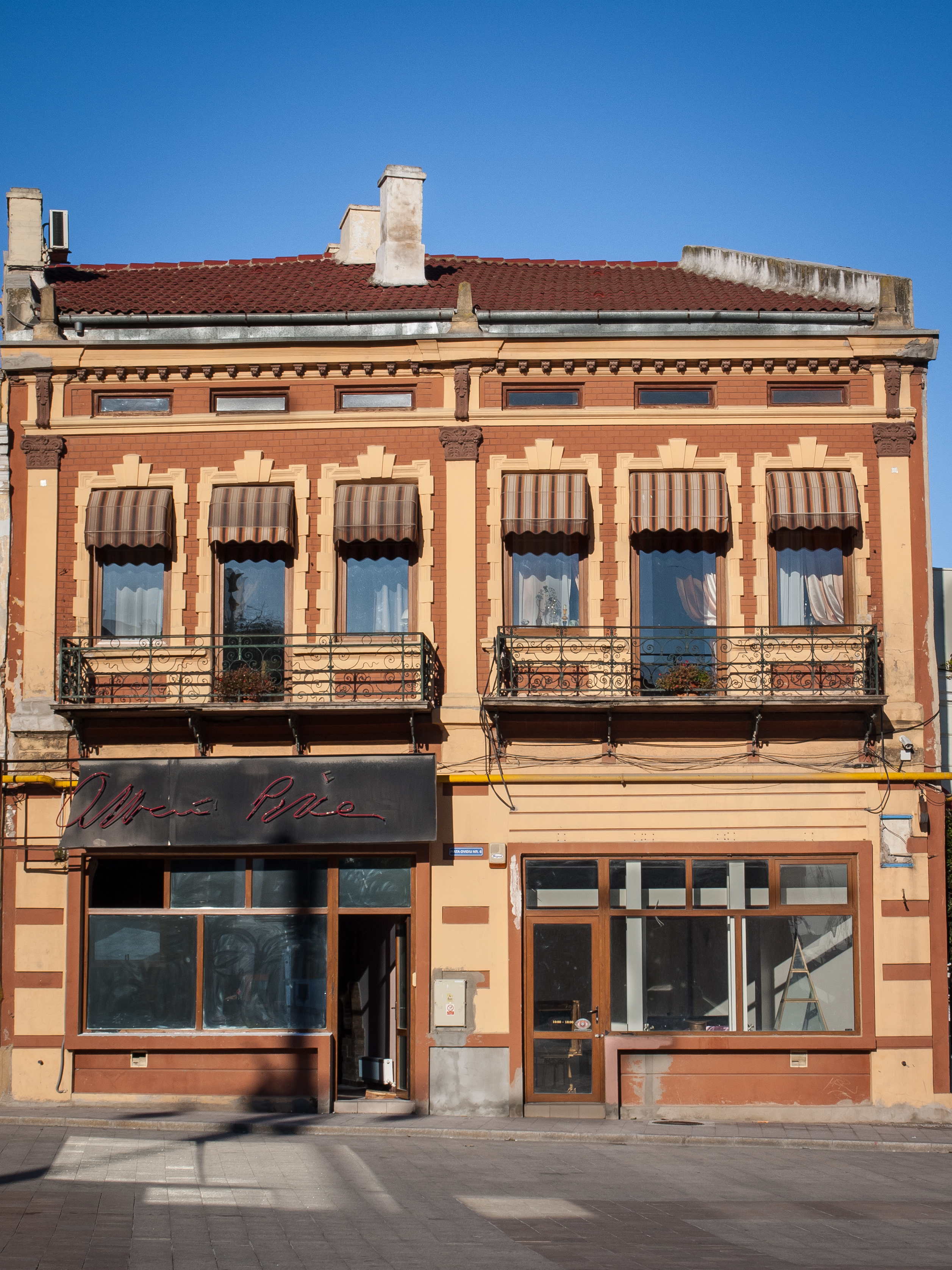 Casa se află în Piața Ovidiu 6, Constanța.